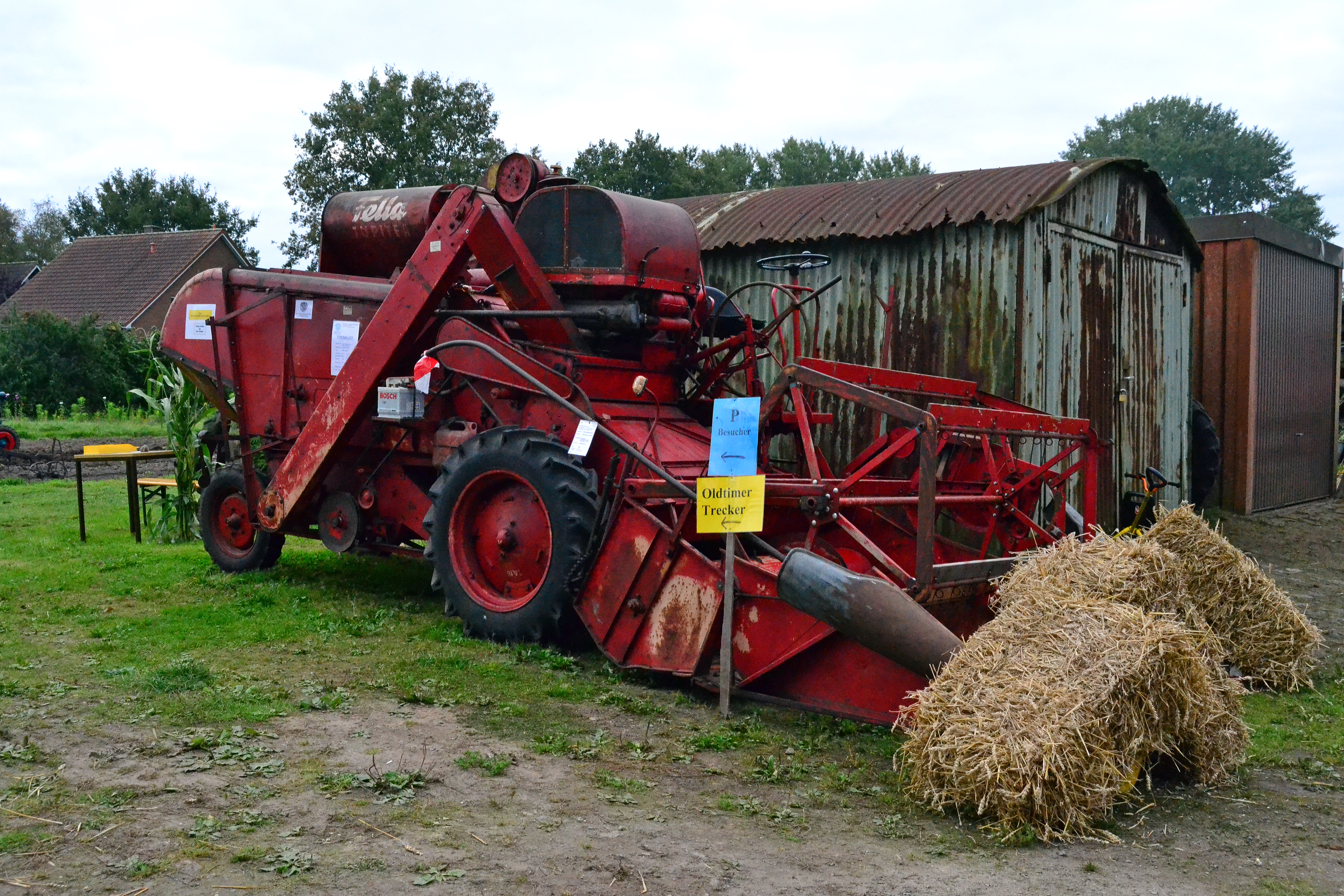 Fella Dreschmaschine „Jupiter“ Baujahr 1960, angetrienen von einem Volkswagen Industriemotor Typ 122, 29 PS 1192 ccm